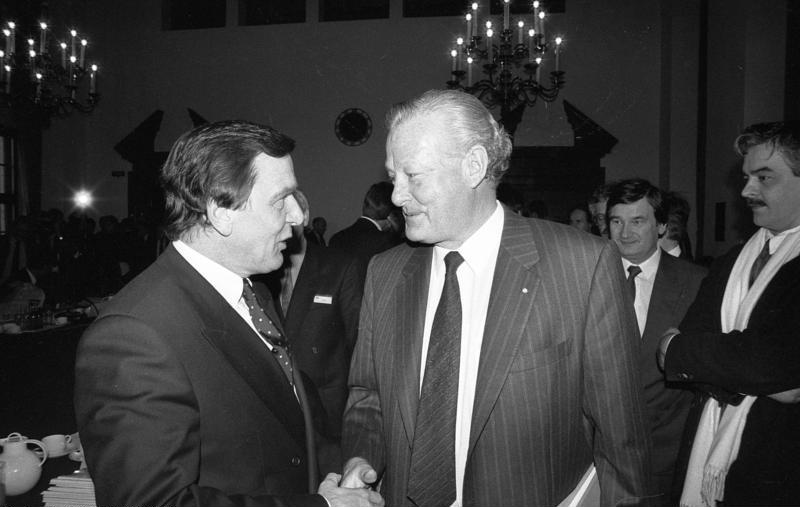 20.-21.12.1990 Konferenz der Regierungschefs der 16 Bundesländer der Bundesrepublik Deutschland in München 21.12. Ministerpräsidentenkonferenz unter Vorsitz des niedersächsischen Ministerpräsidenten, Gerhard Schröder, im historischen Sitzungssaal des bayerischen Staatsministeriums für Wirtschaft und Verkehr, in dem 1947 die letzte Ministerpräsidentenkonferenz der 16 deutschen Länder stattfand.